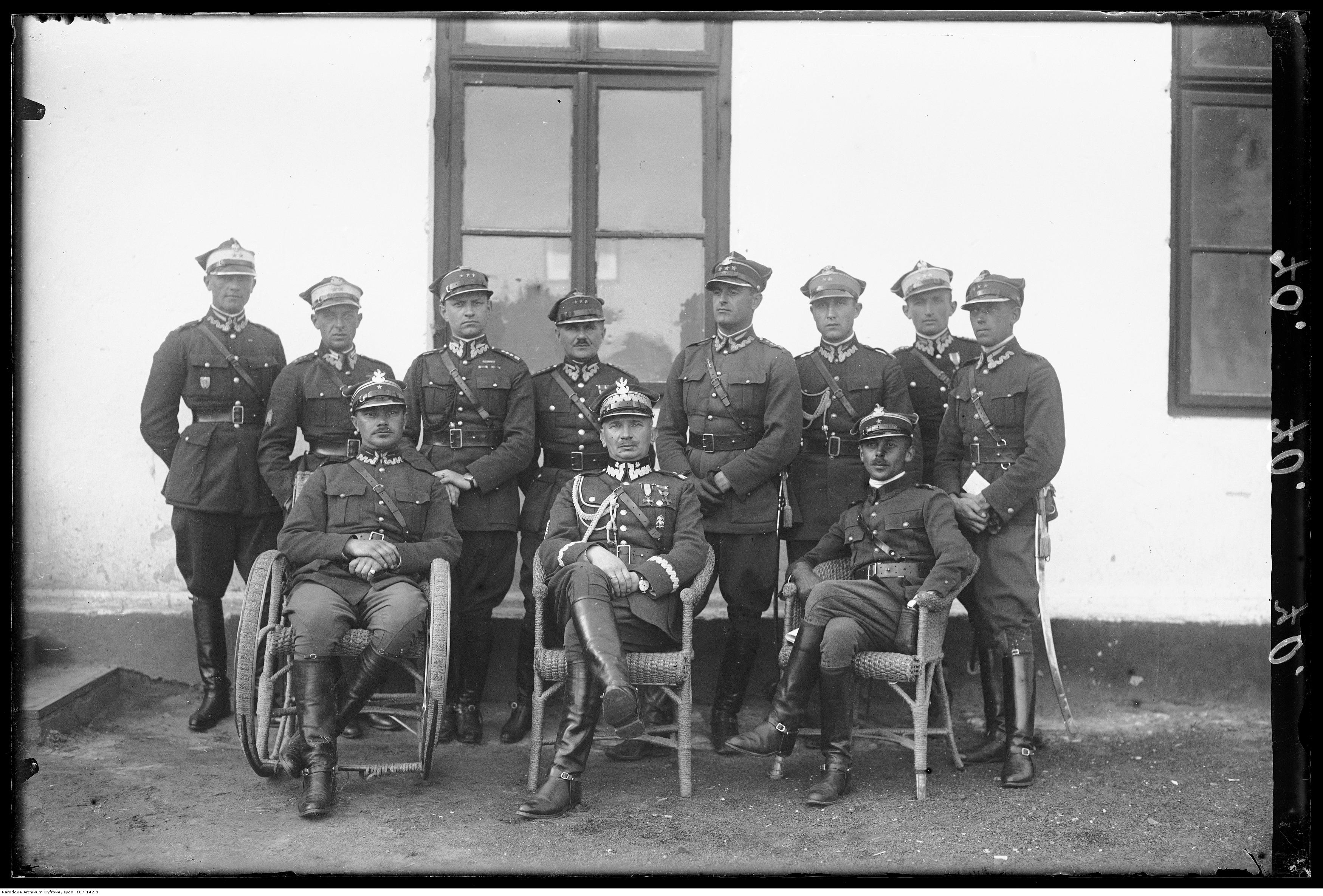 Grupa oficerów. Siedzą od prawej: mjr Tadeusz Komorowski, gen. Juliusz Rómmel. Wśród stojących: por. Aleksander Sitek (1. z lewej), por. Janusz Kapuściński (2. z lewej), por. Karol Rudnicki (3. z prawej).